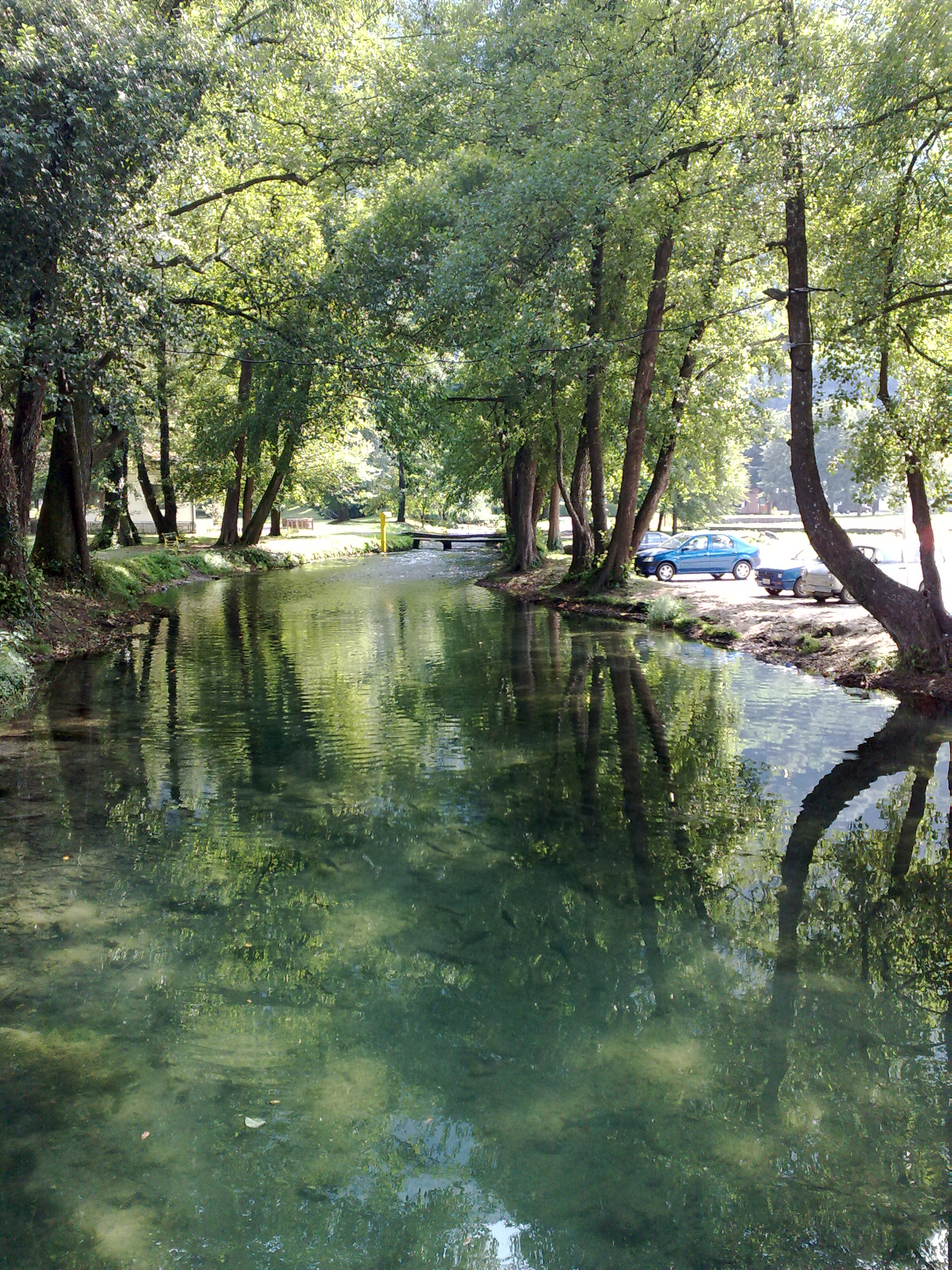 Река Врело у насељу Перућац, Бајина Башта